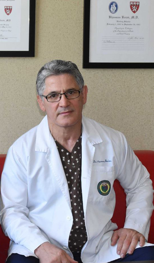 Баиев, Хасан Жунидович - в Грозном 2017 год